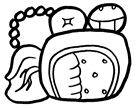 Majų glifas, simbolizuojantis miestą Piedras Negras. Padarytas naudojant freeware Maya font.